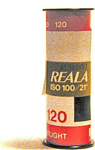 Fujifilm Reala colour negative film in 120 rollfilm format.